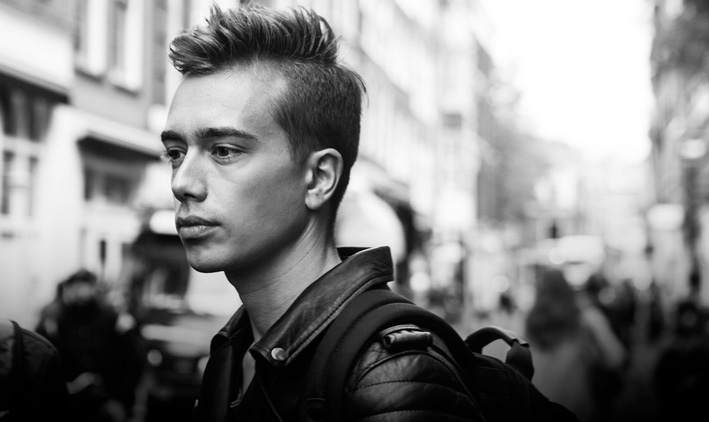 Headhunterz.